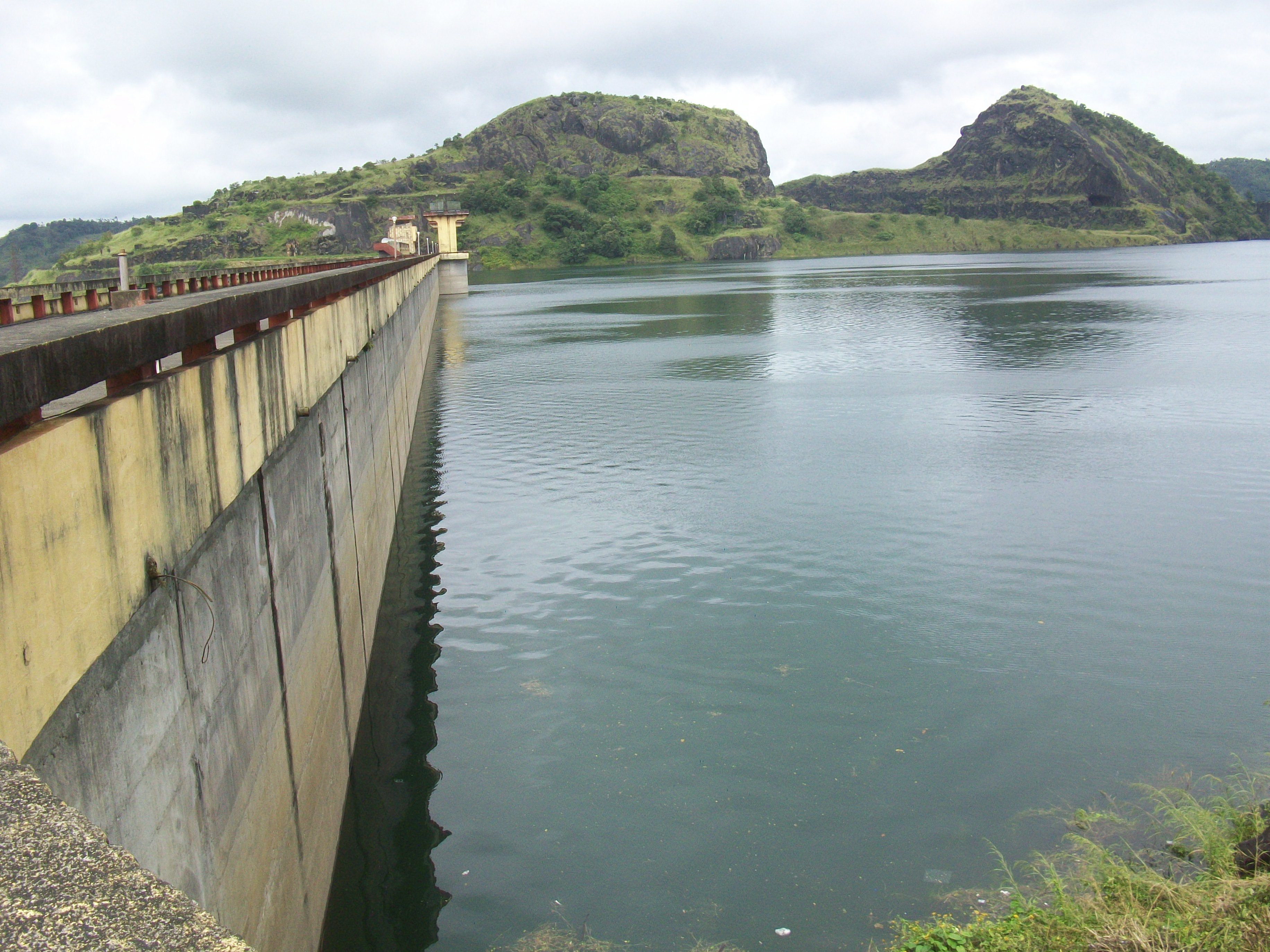 ഇടുക്കി അണക്കെട്ടിന്റെ അനുബന്ധമായ ചെറുതോണി അണക്കെട്ടിൽ ജലം നിറഞ്ഞുകിടക്കുന്നു.